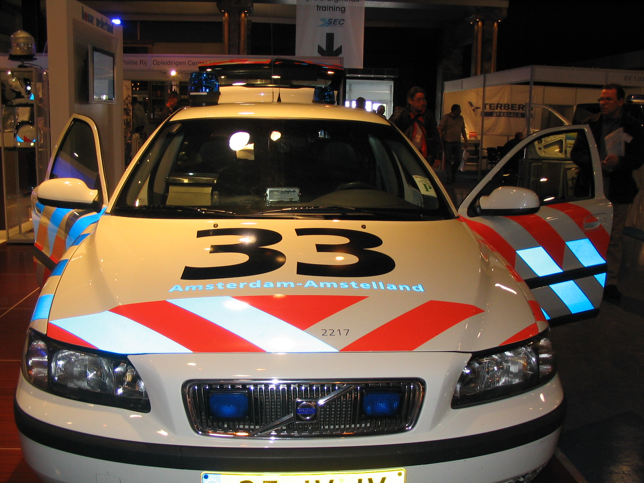 Nederlandse politieauto. Eigengemaakte foto.